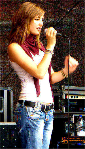 Mona - live 2008